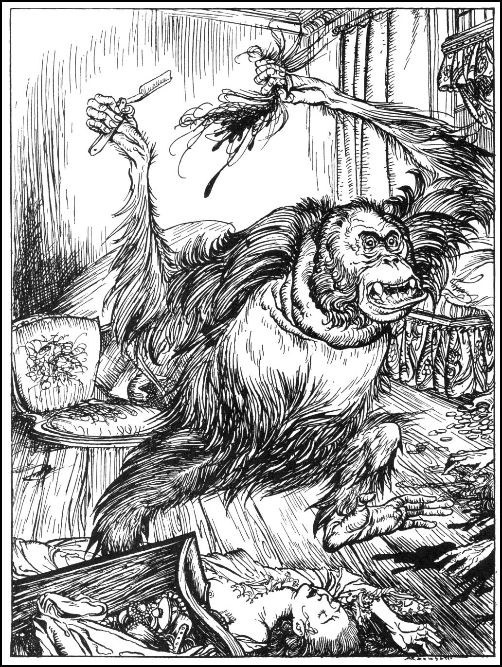 Иллюстрация Артура Рэкхема из книги "Poe's Tales of Mystery and Imagination" к рассказу Эдгара По "Убийства на улице Морг"